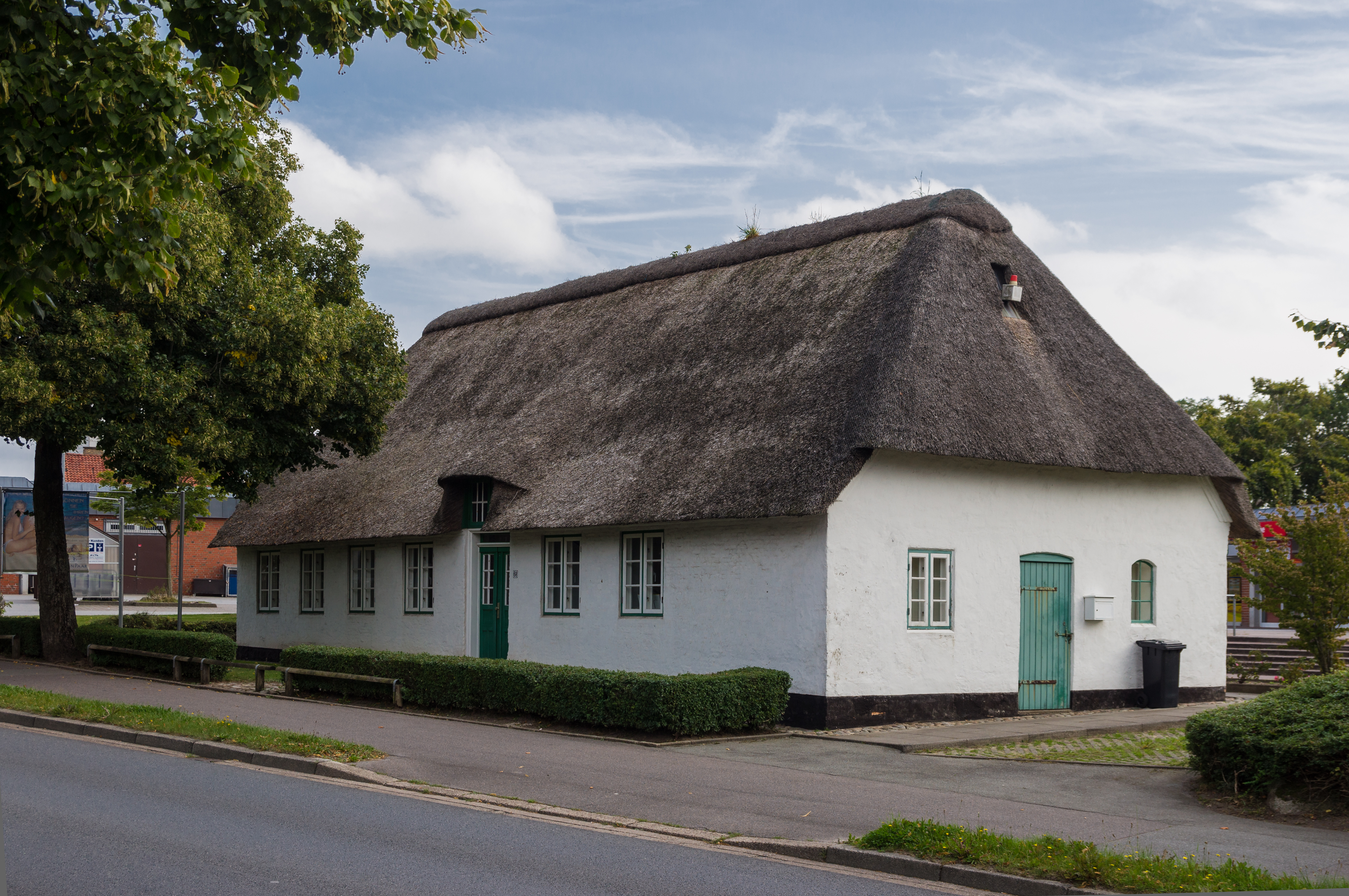 Flensburg-Mürwik, Foerdestraße 68, Kate, Denkmal-Nr. 1. Seit Ende der 1990er als Ladengeschäft genutzt.